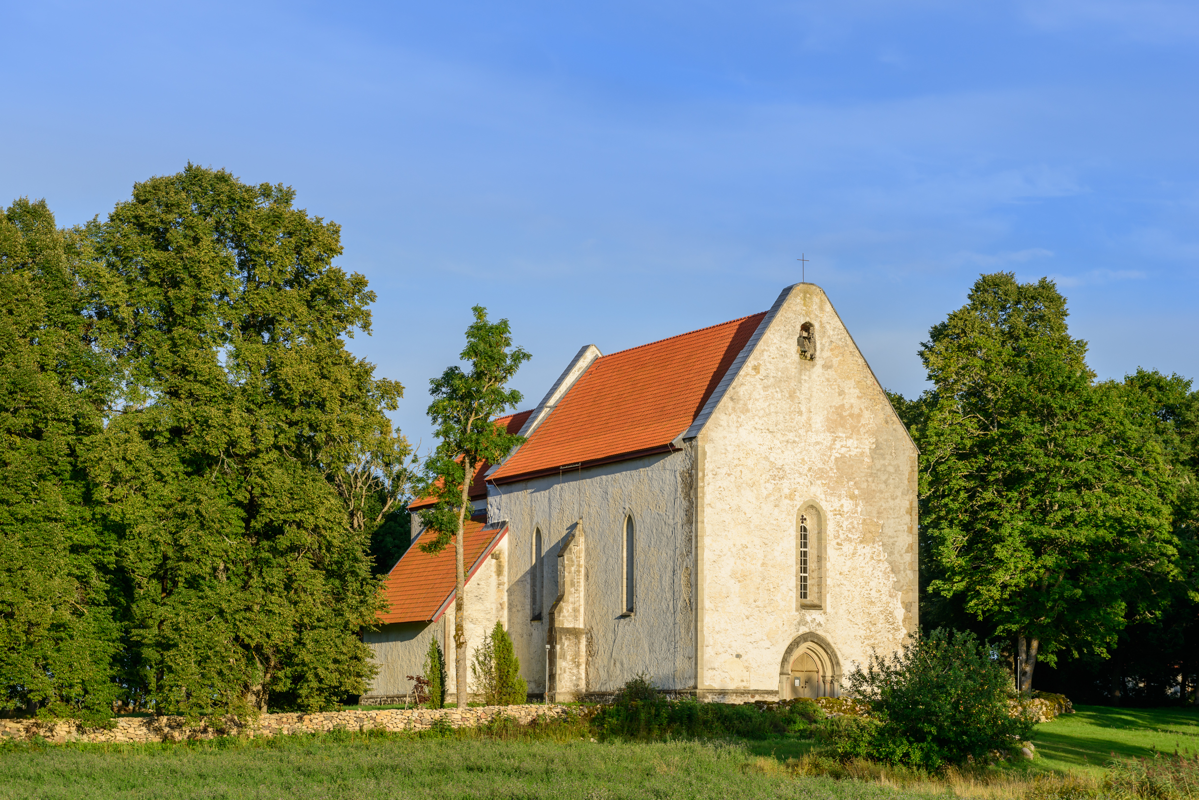 Karja kirik Saaremaal